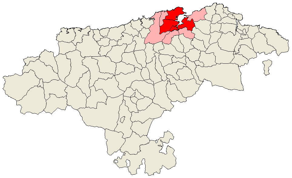 En rojo oscuro los municipios considerados de la comarca de la Bahía, en rojo claro a veces son considerados como tales Map of the comarca of Bahía de Santander, Cantabria, Spain